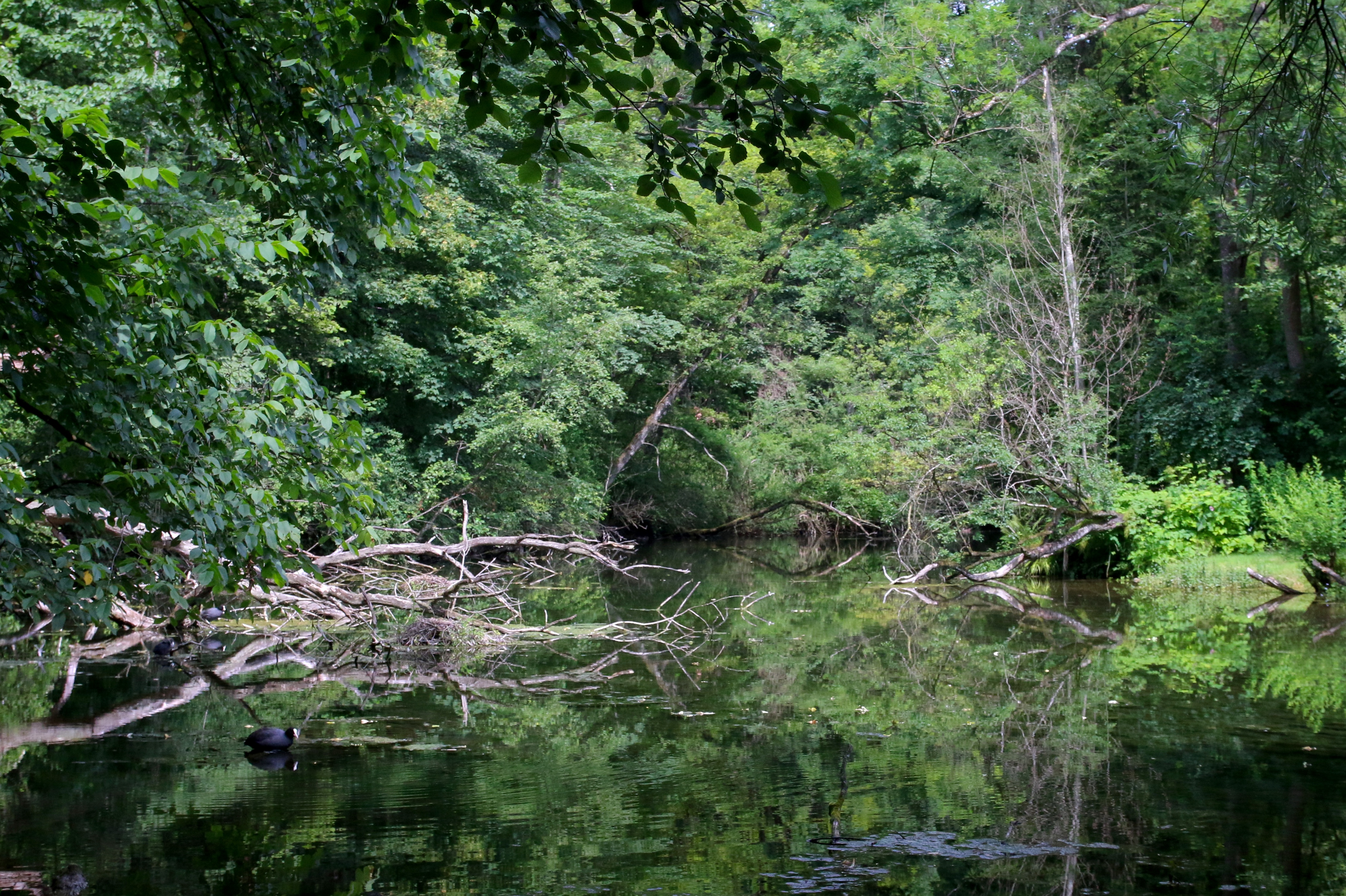 Die Altarme der Ammer in der Unterhauser Au nördlich von Weilheim, mit Blässhuhn.